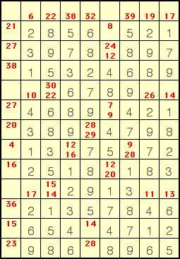 Titre:exemple de nombres fléchés Licence:GFDL Source: Roby Roby